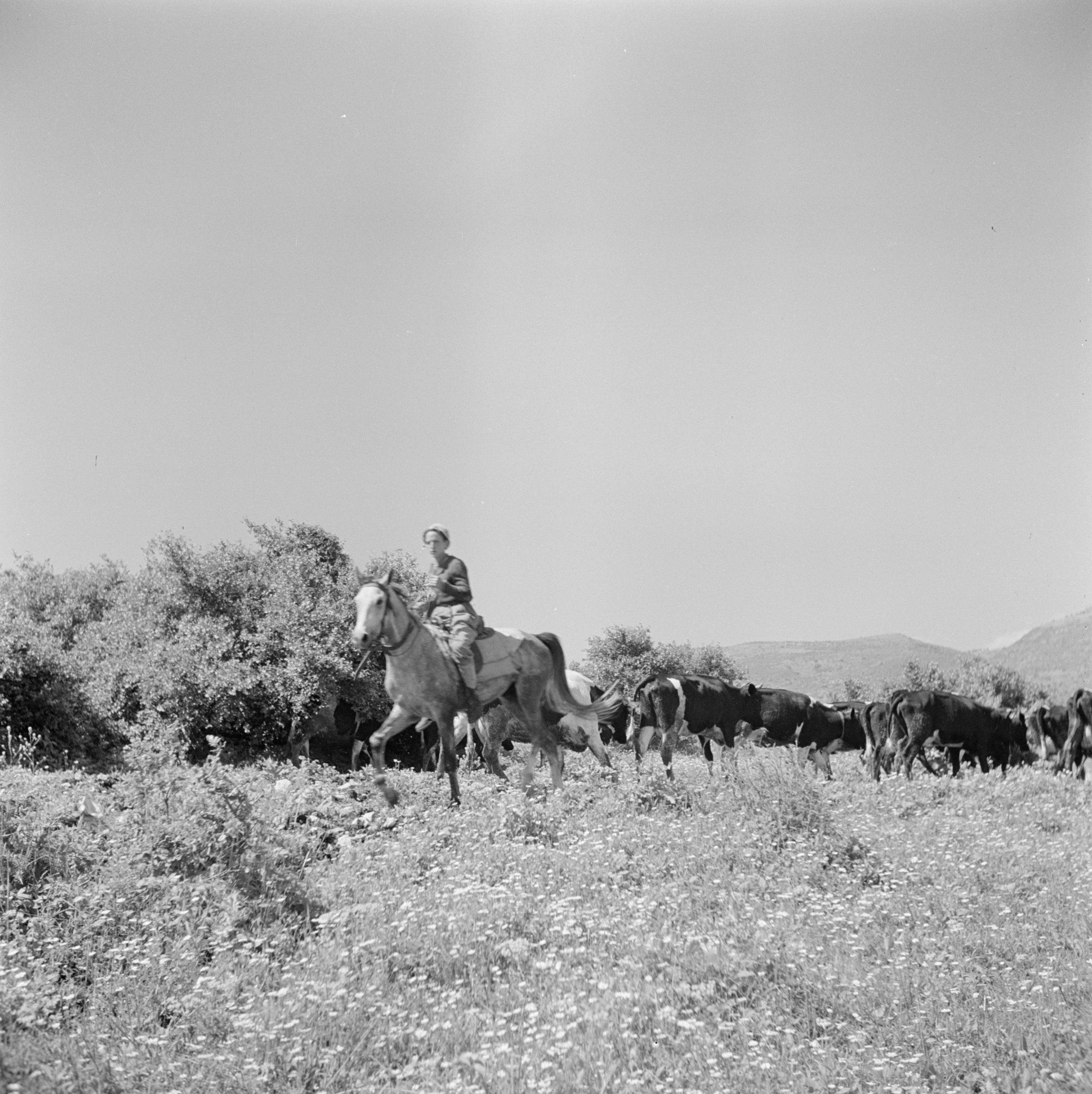 Collectie / Archief : Fotocollectie Van de Poll Reportage / Serie : Israël 1948-1949: Galilea, herder met kudde Beschrijving : Bereden herder met een kudde koeien Datum : 1948 Locatie : Galilea, Israël Trefwoorden : herders, koeien, kudden, paarden, veeteelt Fotograaf : Poll, Willem van de, [onbekend] Auteursrechthebbende : Nationaal Archief Materiaalsoort : Negatief (zwart/wit) Nummer archiefinventaris : bekijk toegang 2.24.14.02 Bestanddeelnummer : 255-0845